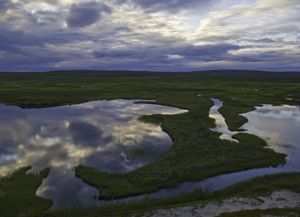 Maaterjoki river delta, lake Pöyrisjärvi, Finnish Lapland.